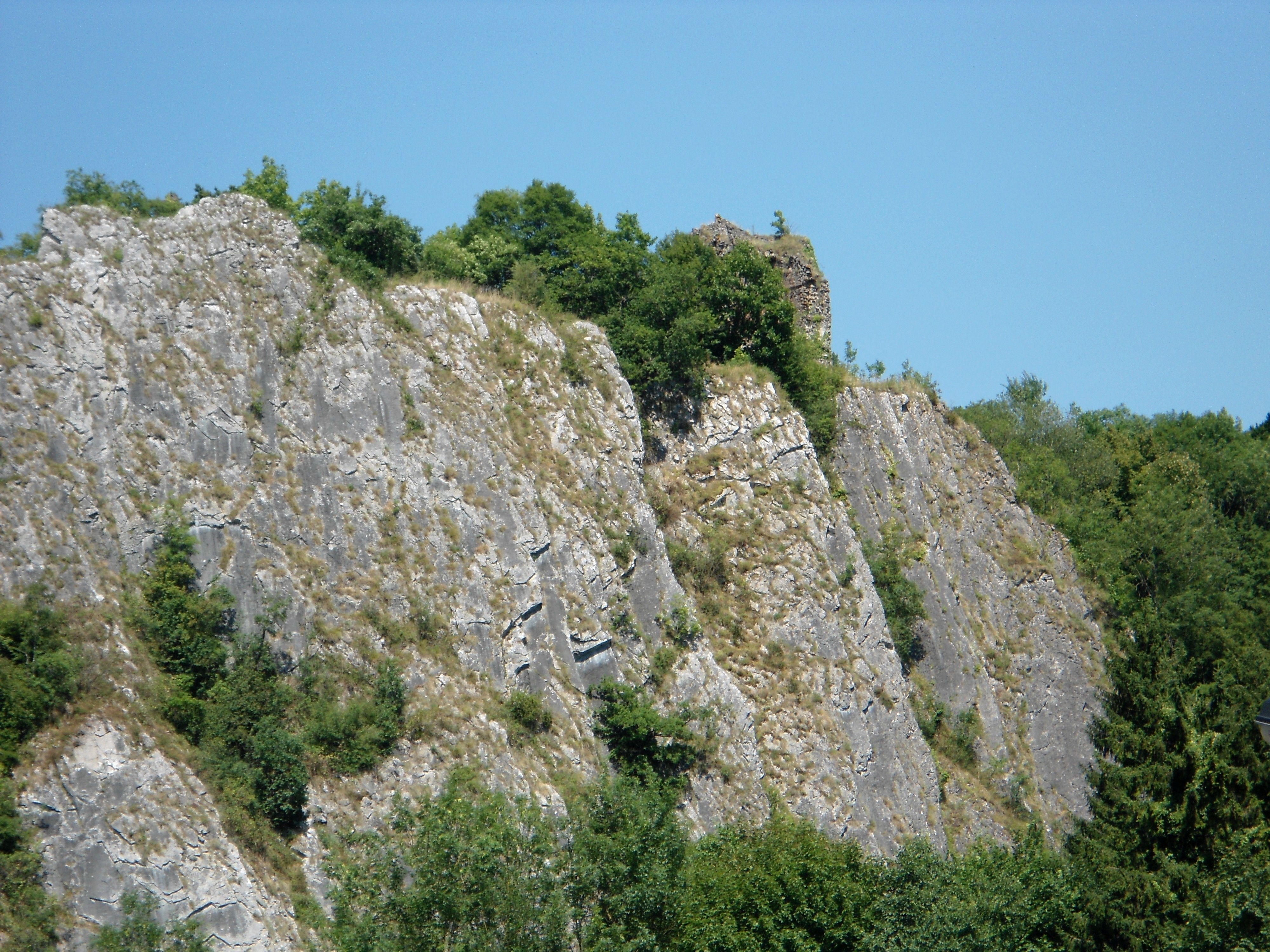 Falaise et ruines du Château d'Amblève à Aywaille